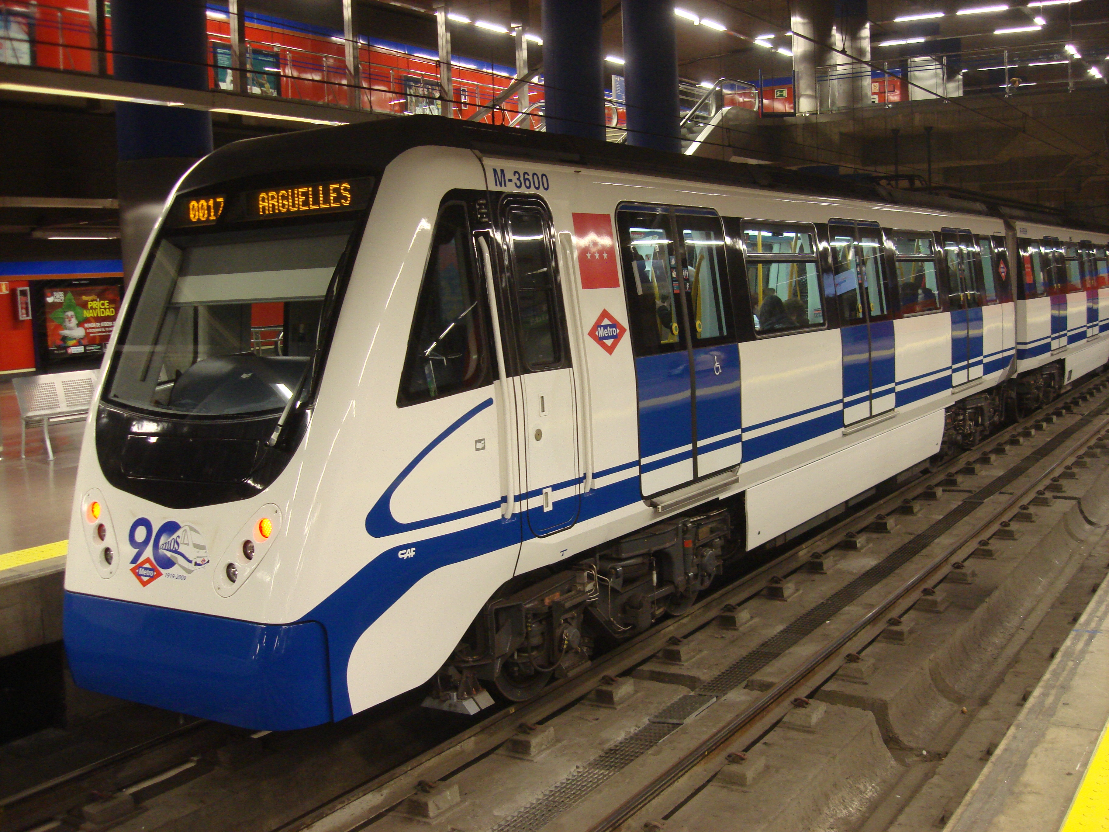 Own work